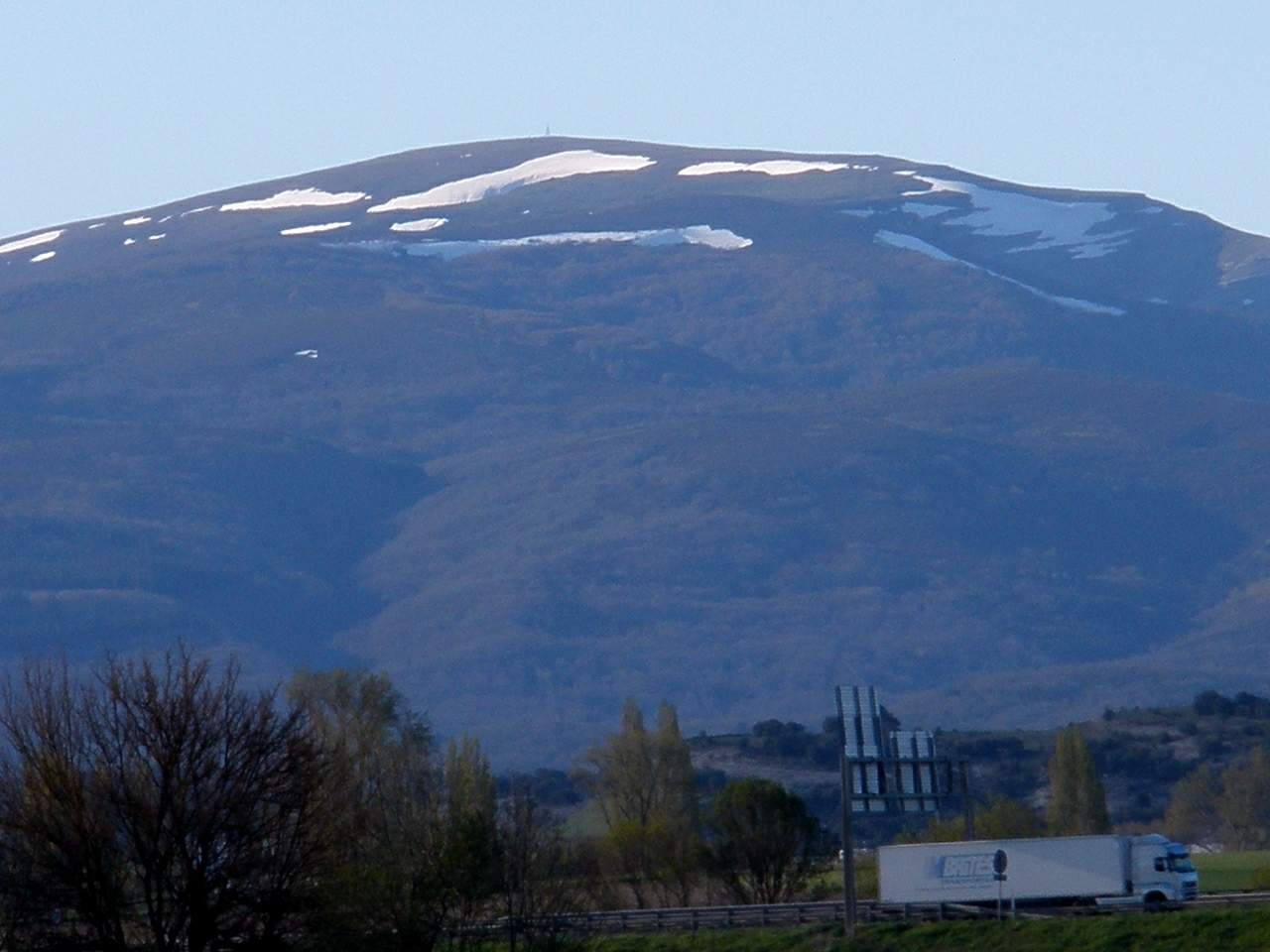 Vista del monte Gorbea desde Vitoria